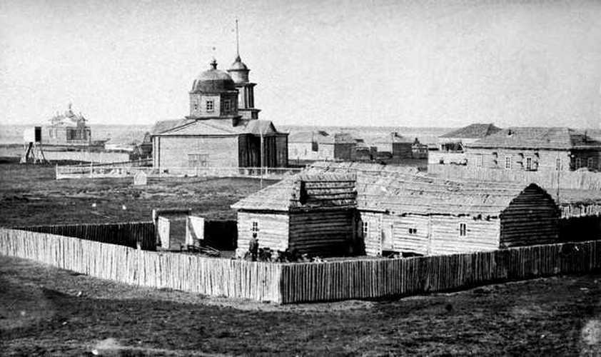 An old wooden church in Okhotsk